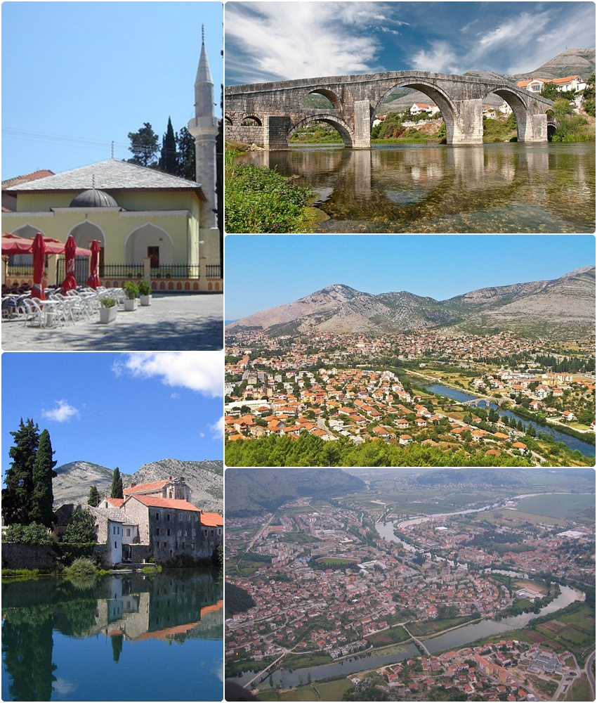 Trebinje